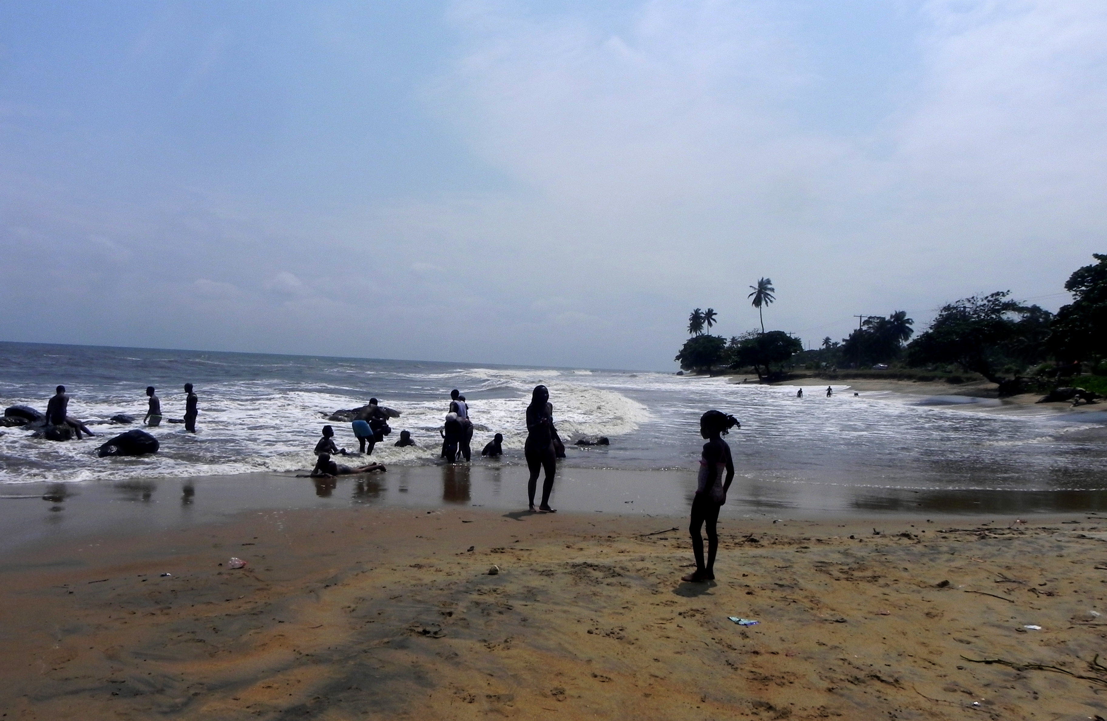 La plage de Kribi